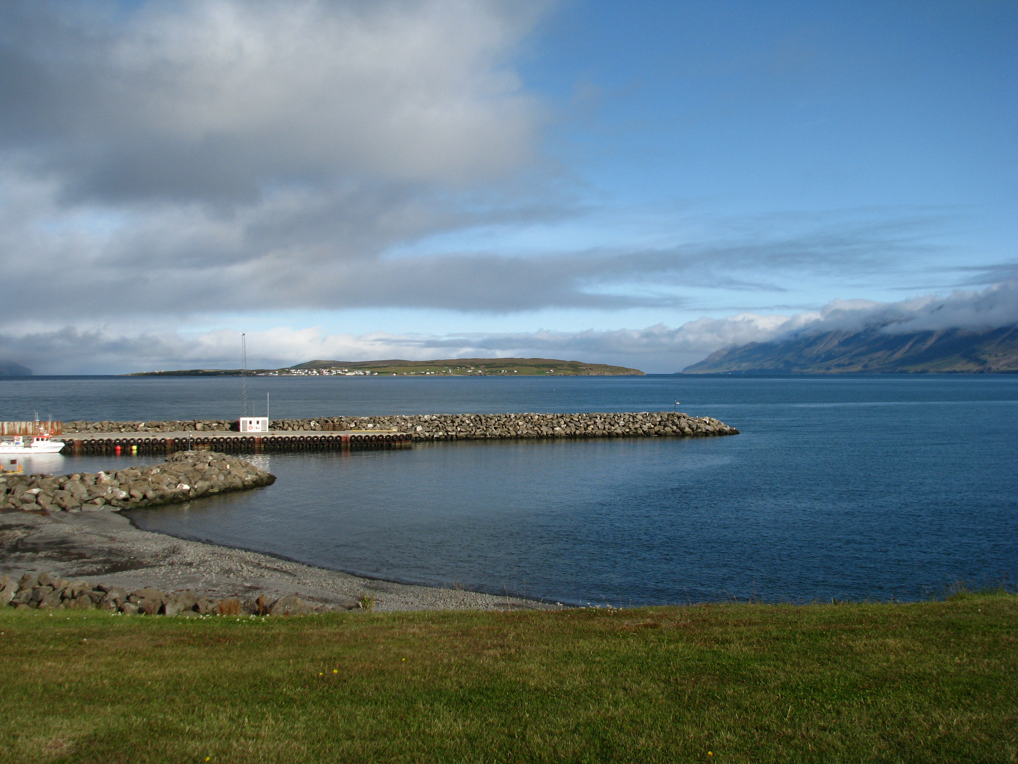 Haven van Árskógssandur, IJsland